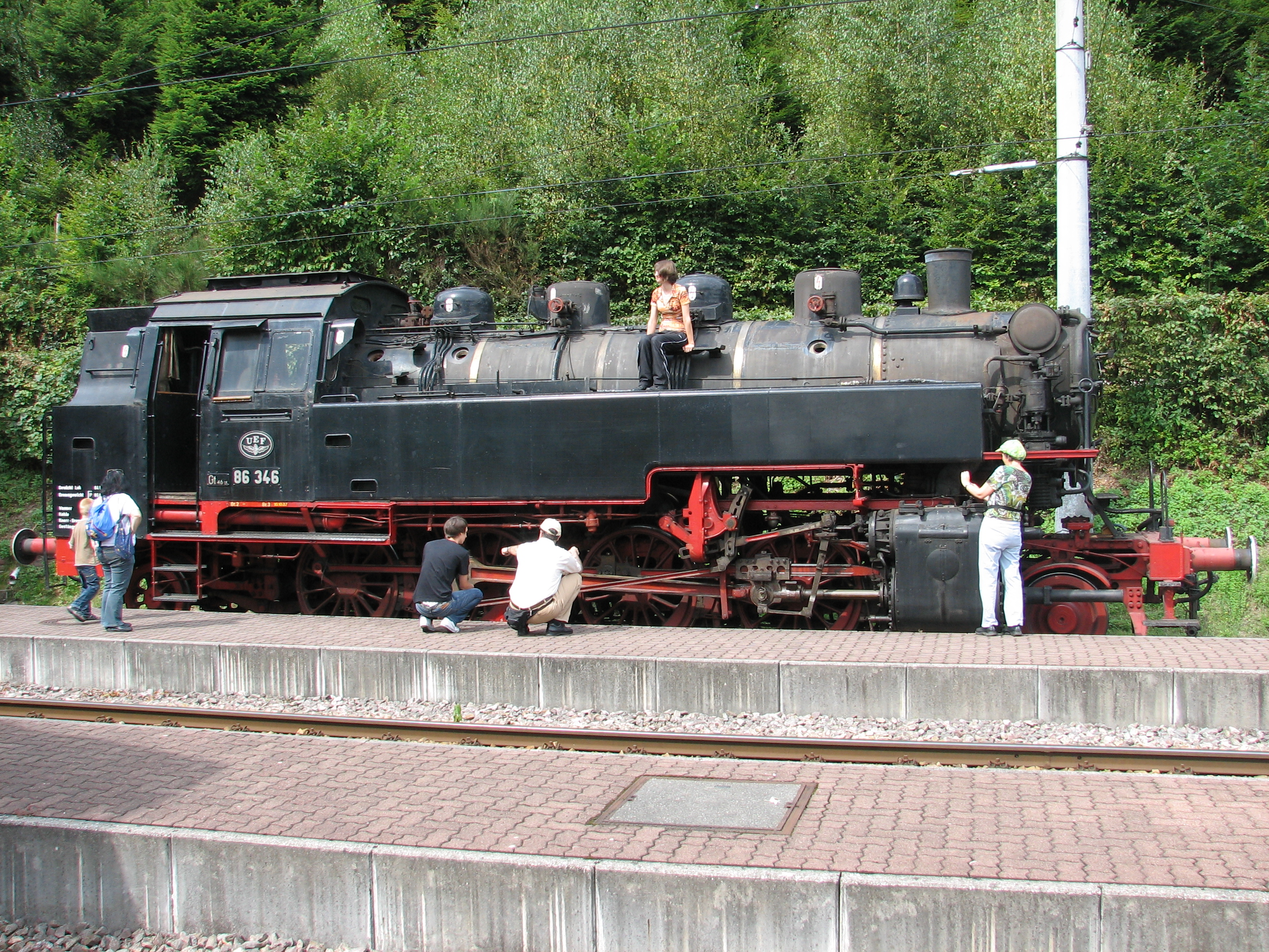 DR-Baureihe 86 der Ulmer Eisenbahnfreunde im Bahnhof von Bad Herrenalb